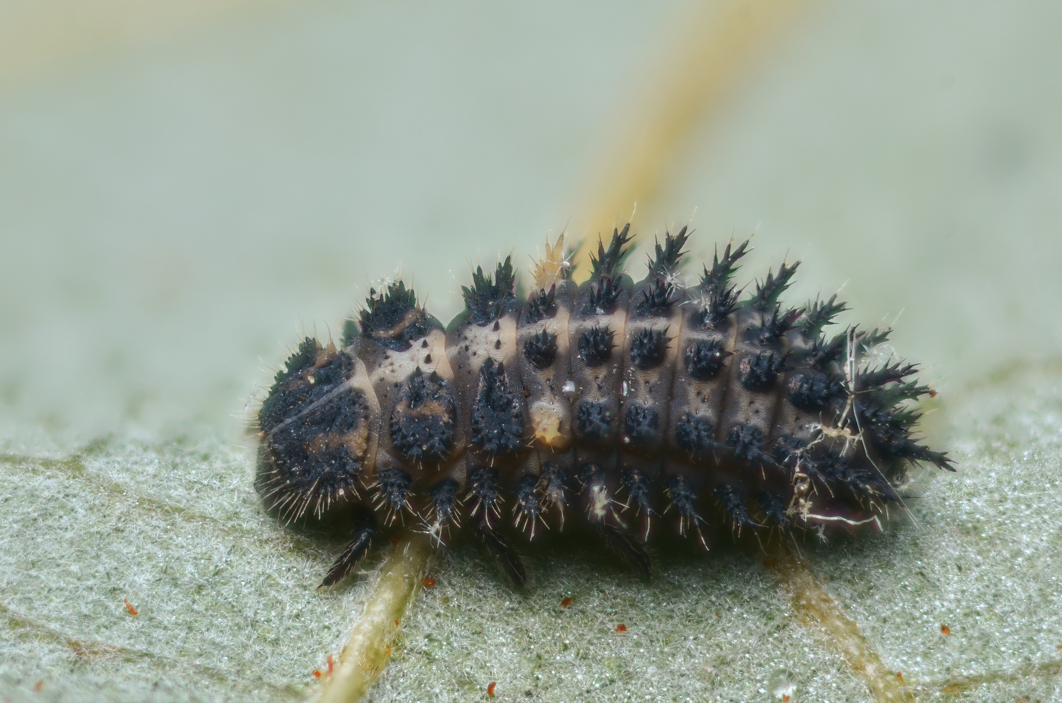 Exochomus quadripustulatus larva